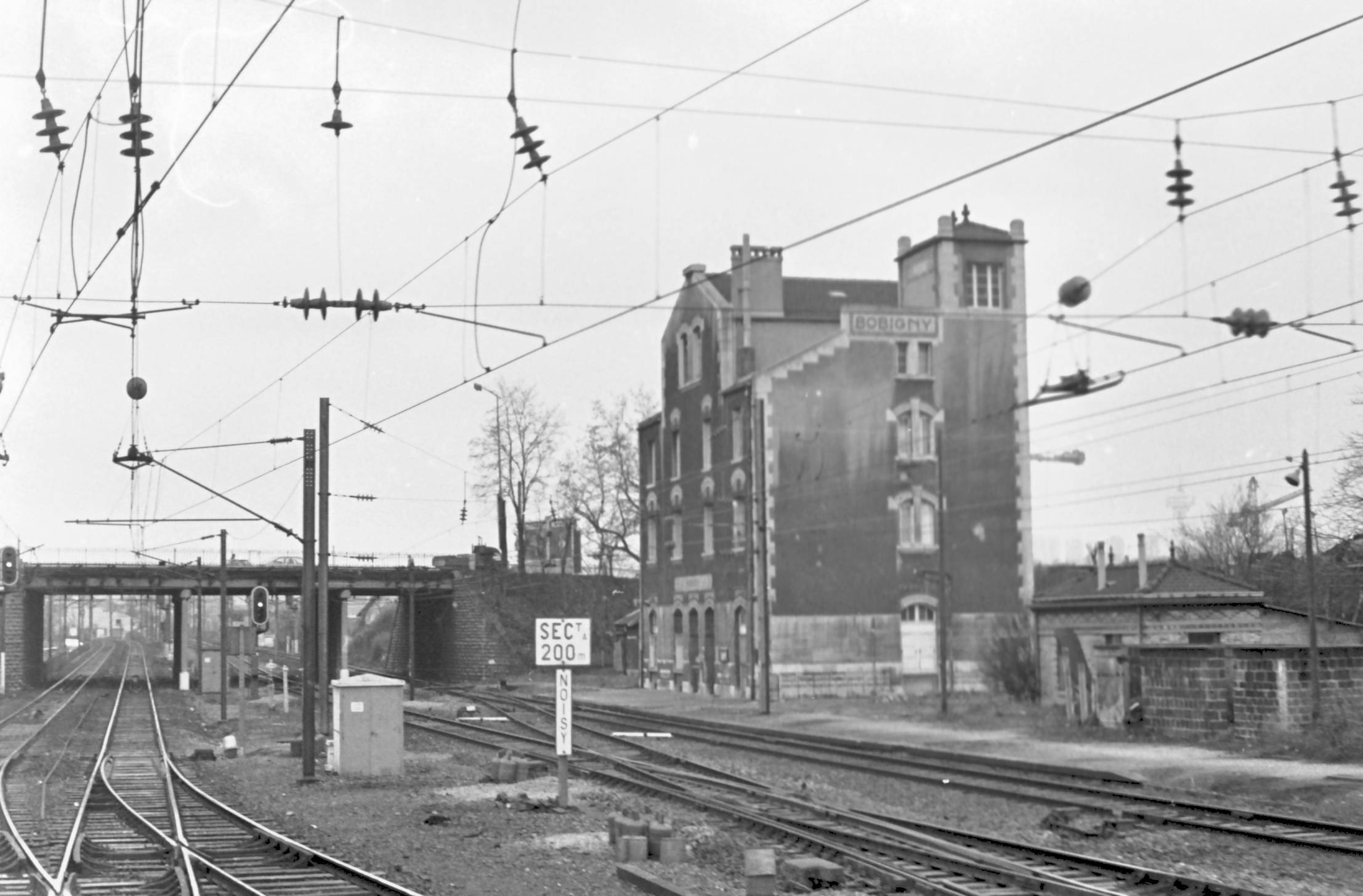 Grande Ceinture : vue du bâtiment voyageurs de la gare de Bobigny lors d'un voyage organisé par le COPEF.